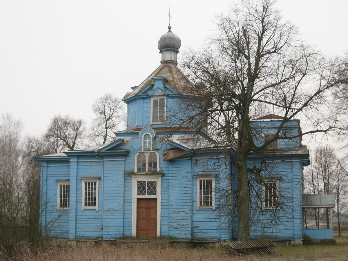 Зорычы. Свята-Успенская царква